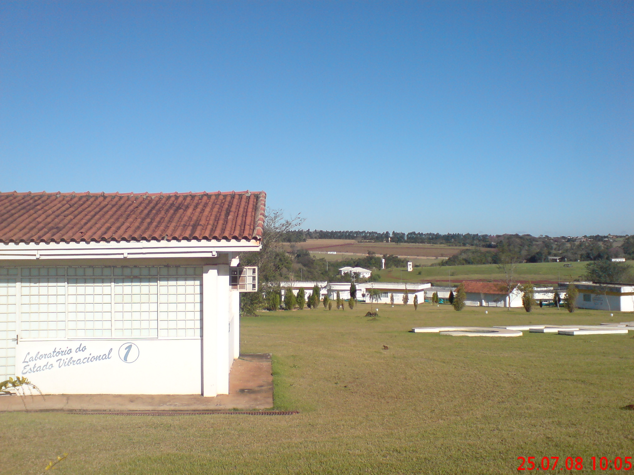 Um dos laboratórios de autopesquisa no campus do CEAEC, em Foz do Iguaçu (2008).